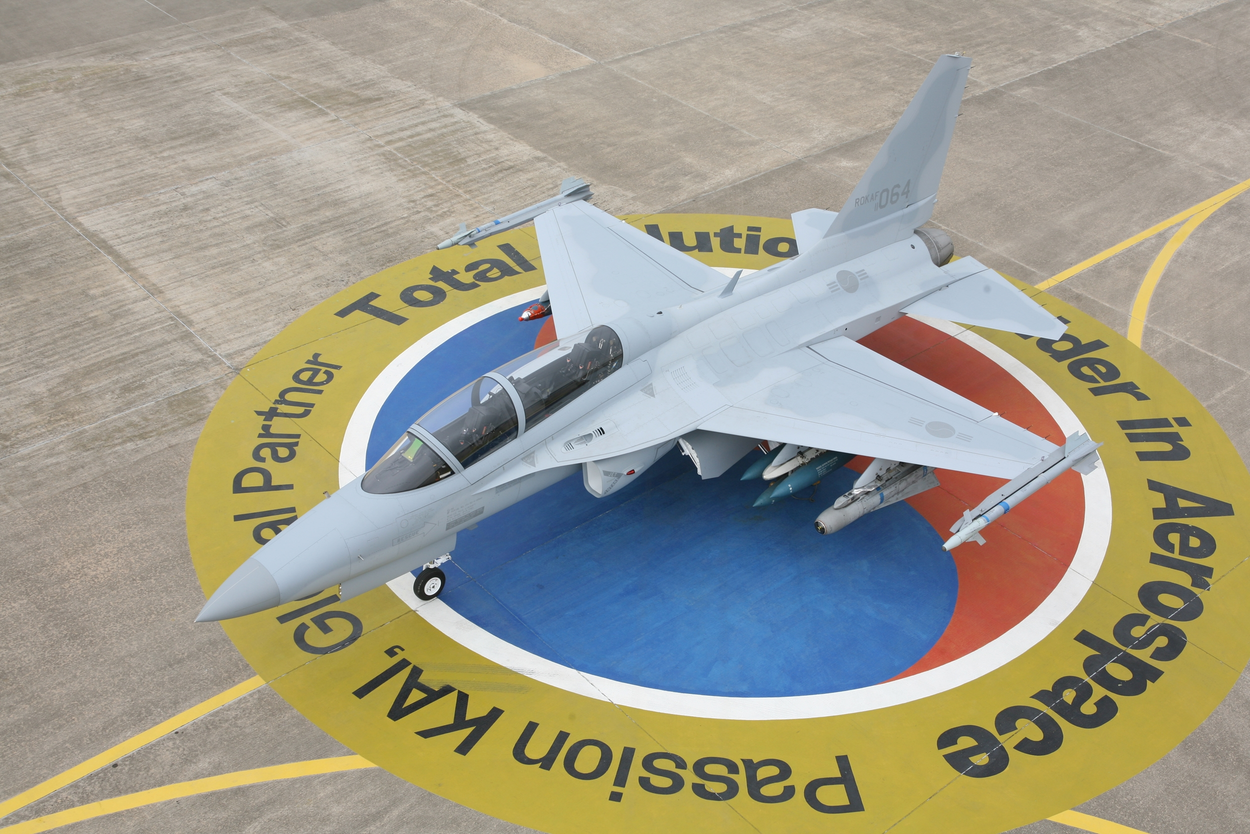 전환 훈련기